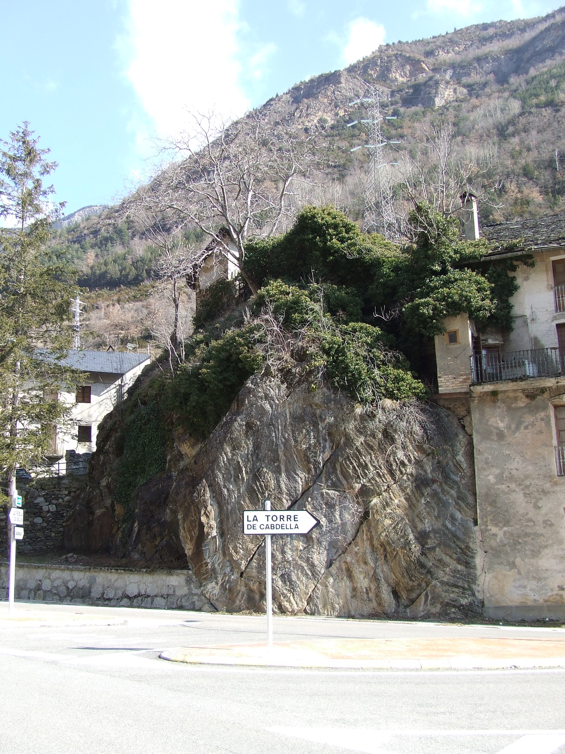 Lloc on hi hagué la torre que dóna nom al poble (la Torre de Cabdella, Pallars Jussà)